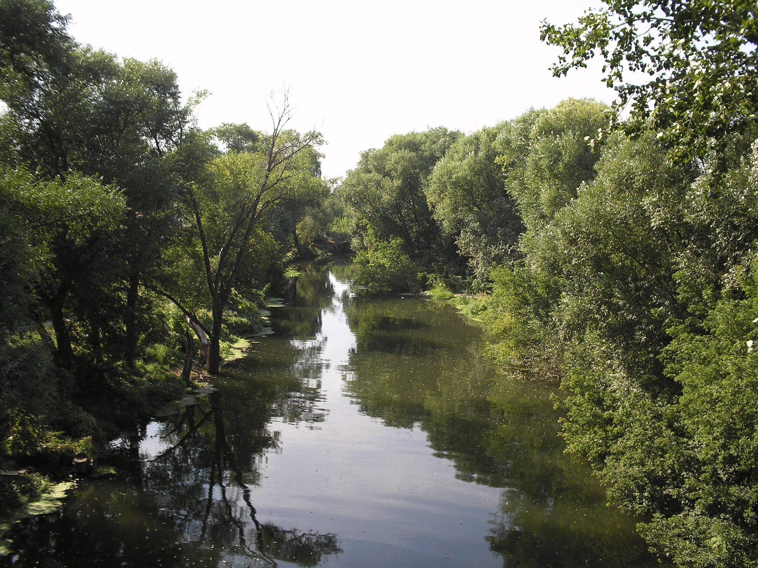 Der Fluss Medwediza (Atkarsk)